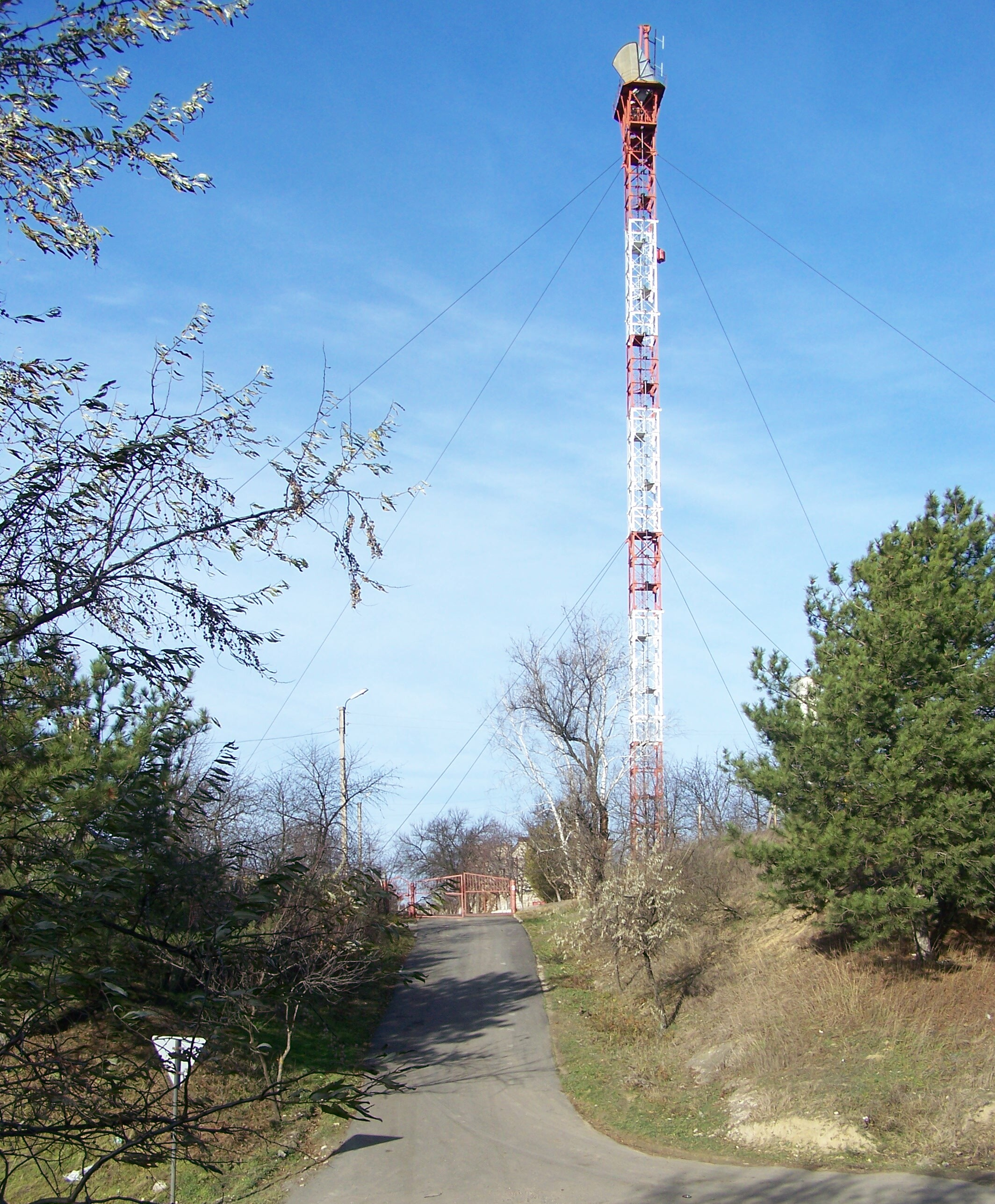 Чимишлийская РРС